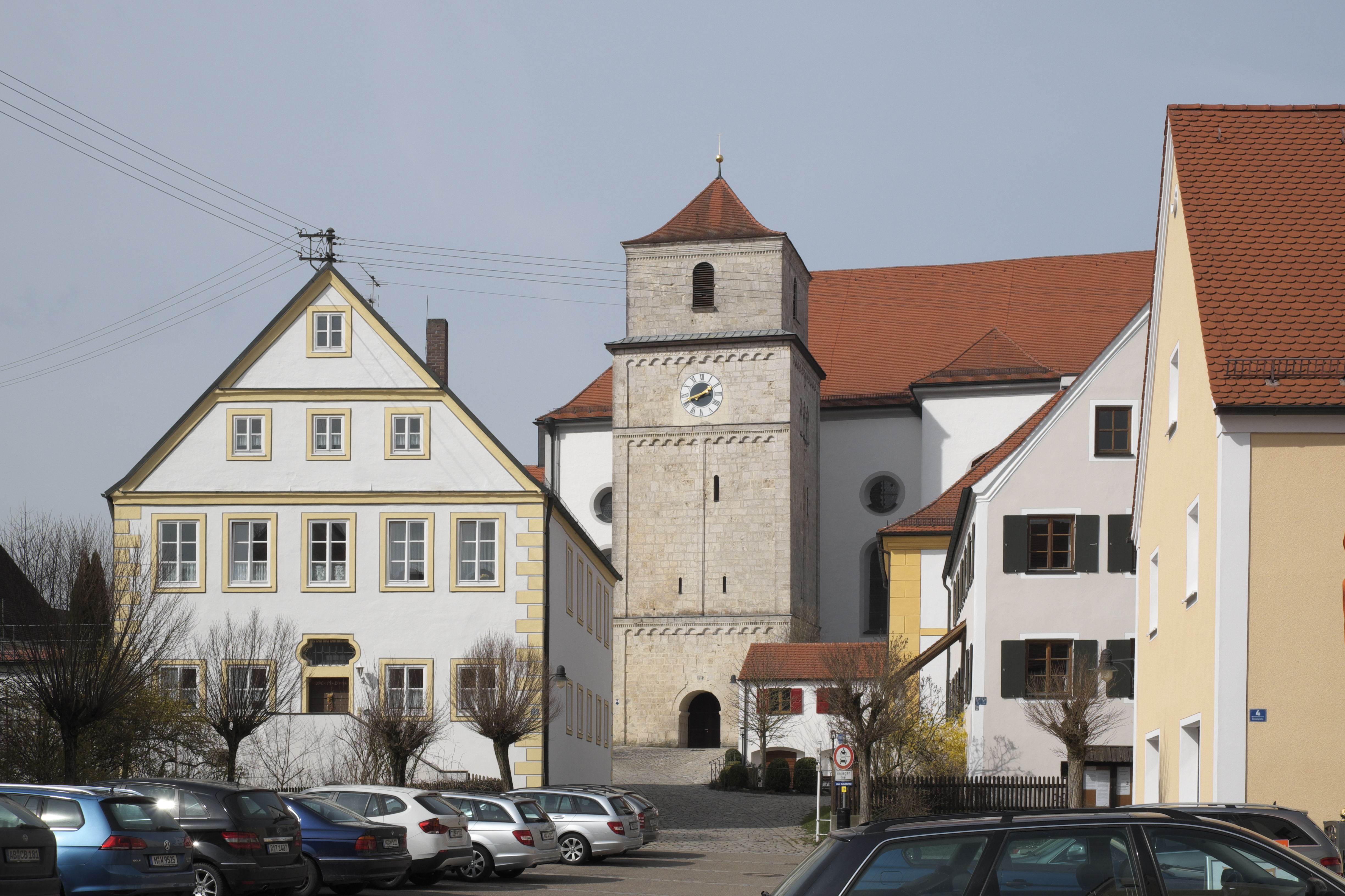 Ehemaliges Benediktinerinnenkloster, Kloster Bergen, in Bergen, einem Ortsteil von Neuburg an der Donau im Landkreis Neuburg-Schrobenhausen (Oberbayern/Bayern)